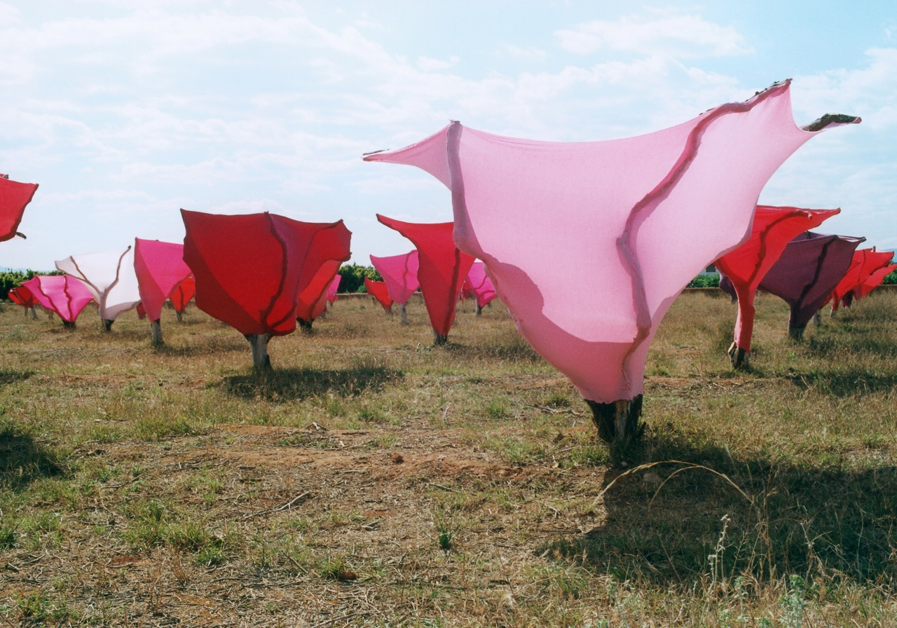 Fotografía de escultura/Intervención. Tela y 270 naranjos muertos